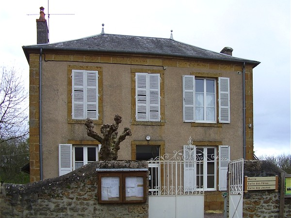 Mairie de Pouques-Lormes (Nièvre)